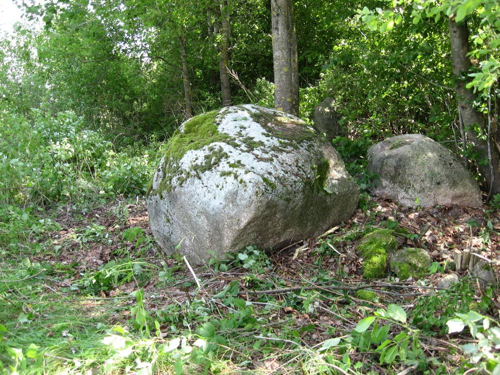 Вайганы. Вялікі камень прусагорскі